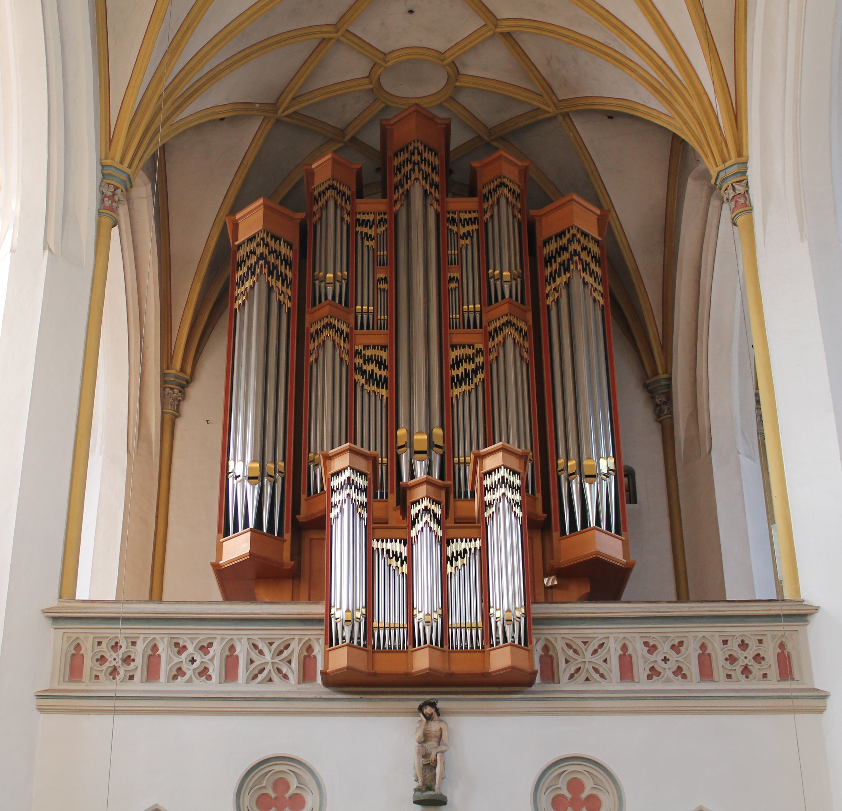 Orgel von St. Johann in Erding